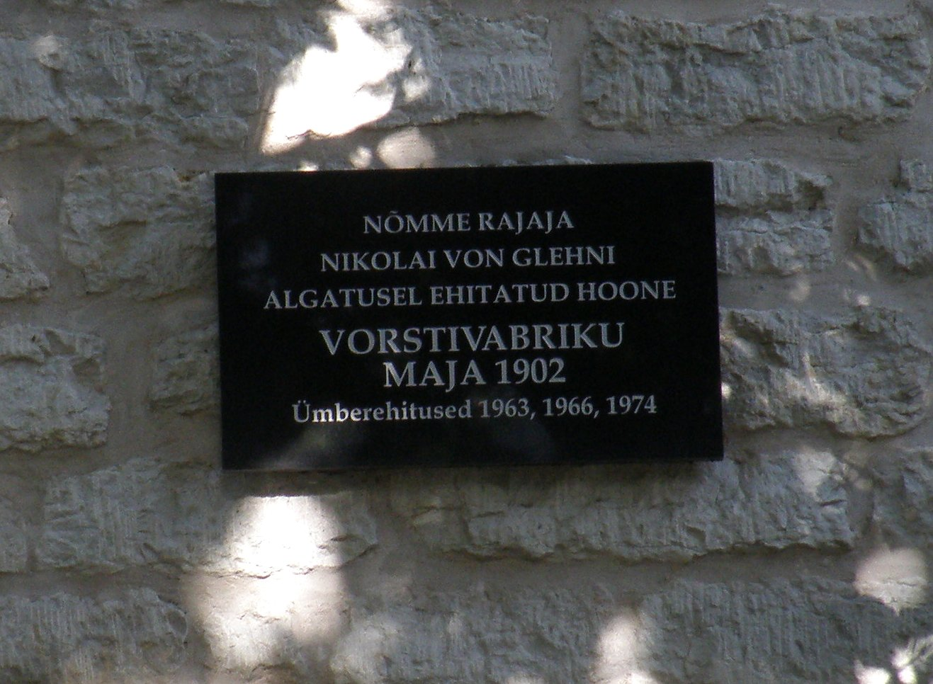 Silt Nõmme muusikakooli majal